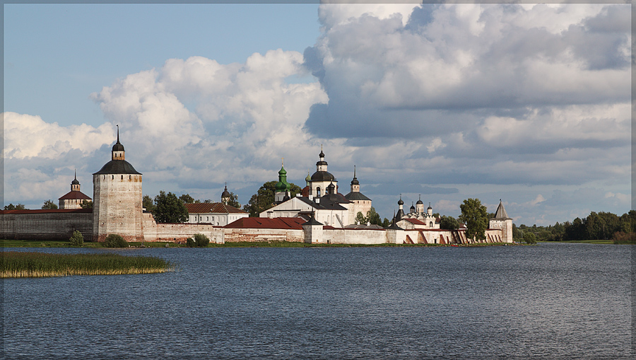 Вид на Кирилло-Белозерский монастырь со стороны Сиверского озера. 2012 год.